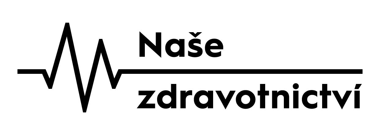 Logo online deníku Naše zdravotnictví. Logo bylo vytvořeno v roce 2017 pro toto médium. Vydavatel jej poskytuje k volnému stažení a užití dle logomanuálu.